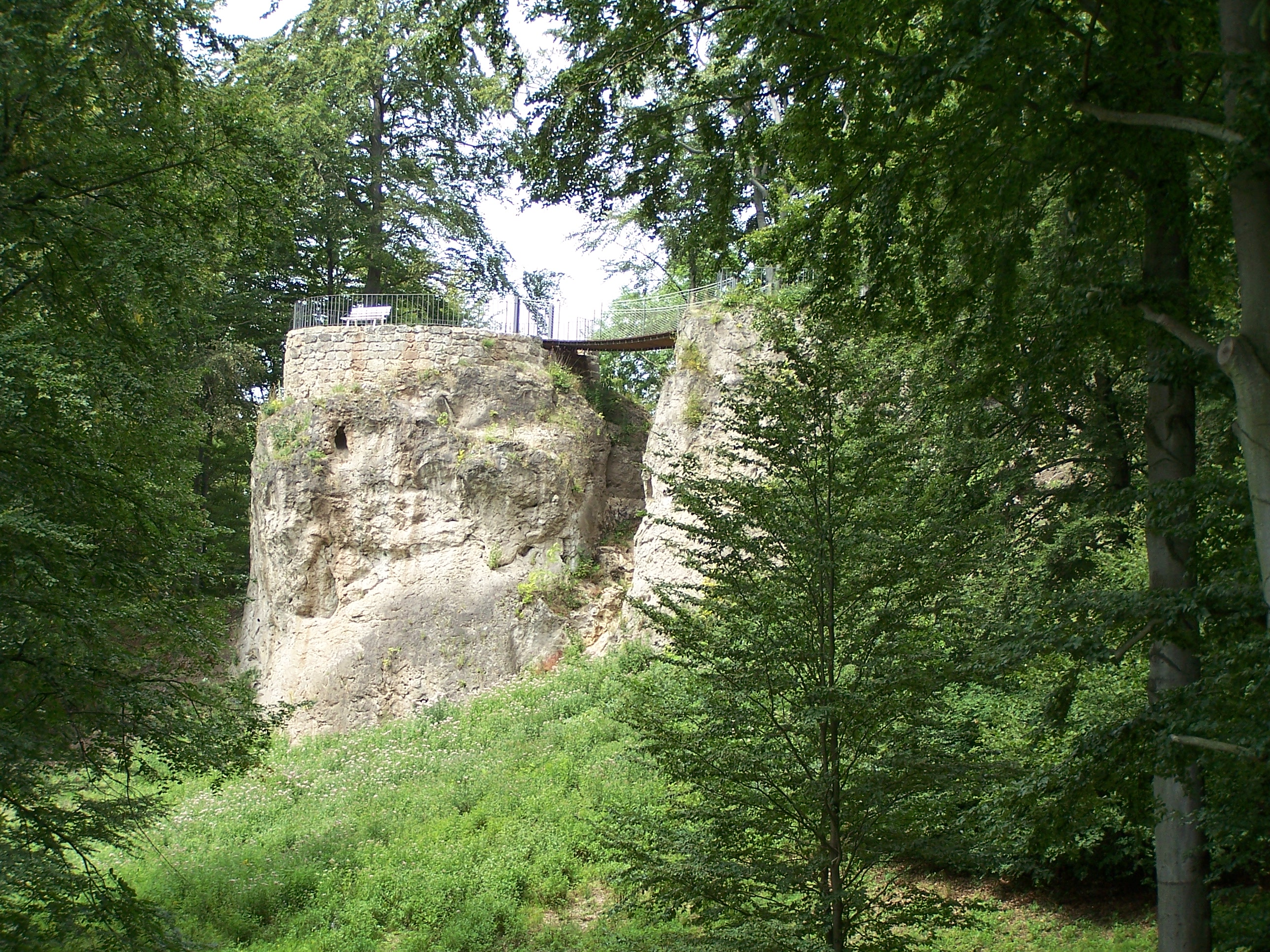 An der Teufelsbrücke.